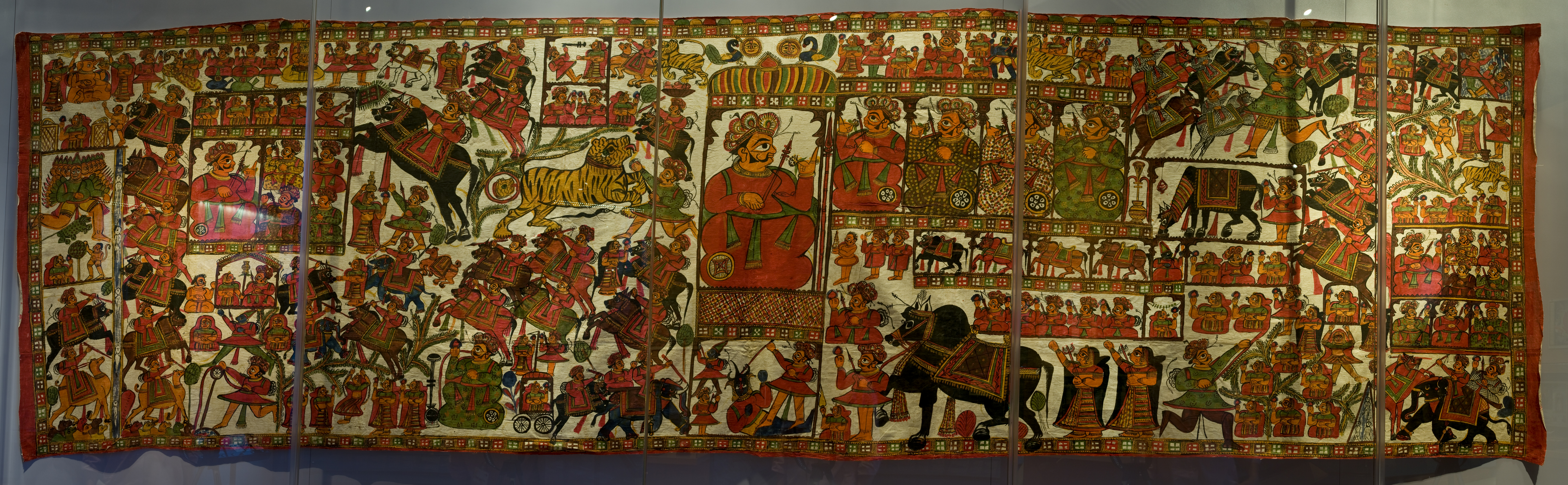 Pabuji-Verteldoek (4669-1) Tropenmuseum - Pabuji-verteldoek (panorama)